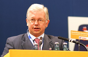 Roland Koch, Hessischer Ministerpräsident, auf dem Landesparteitag der CDU Hessen in Hofheim am Taunus.